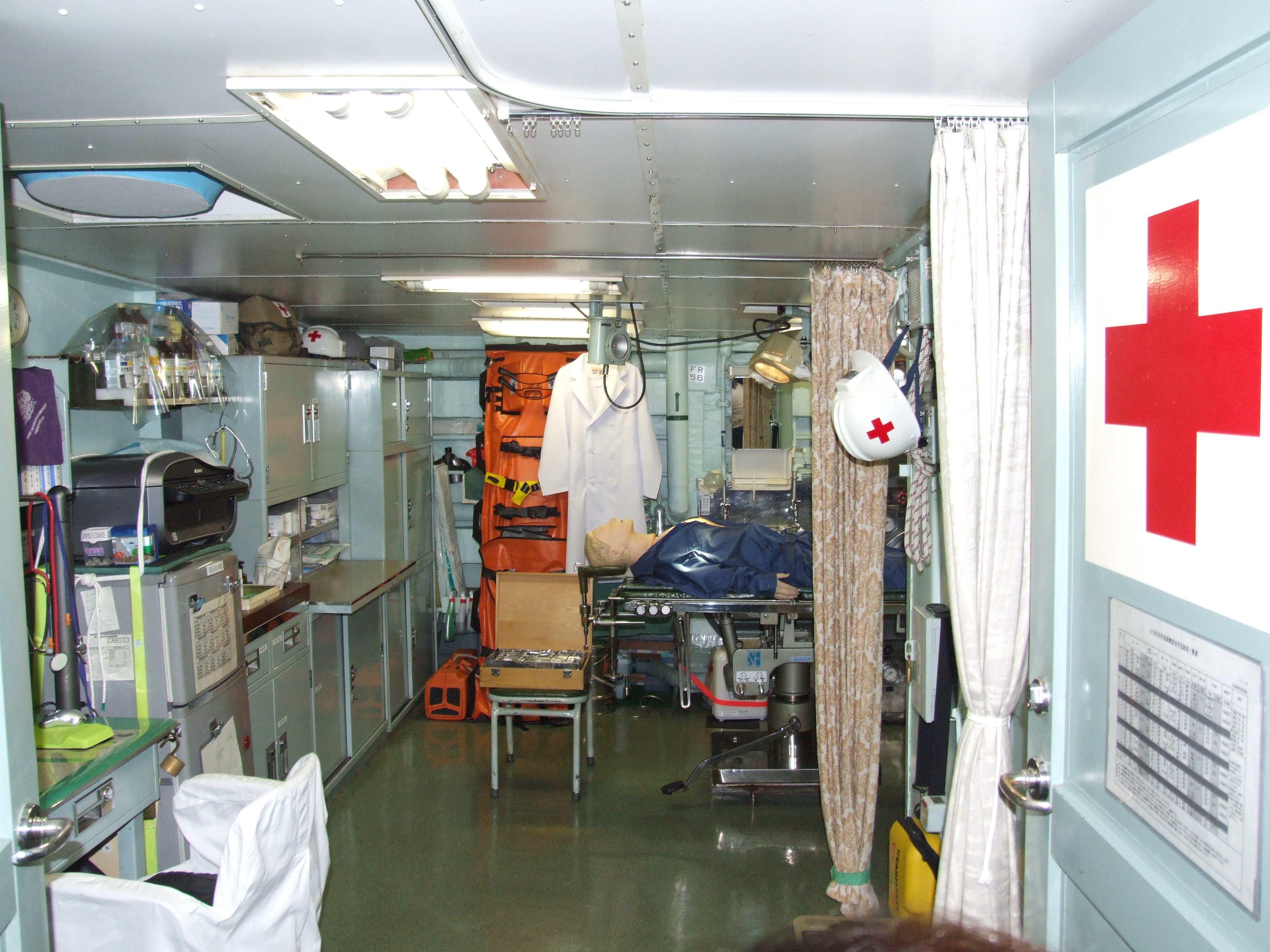 護衛艦しらゆきの医務室。横浜港開港150年の艦内開放にて撮影。